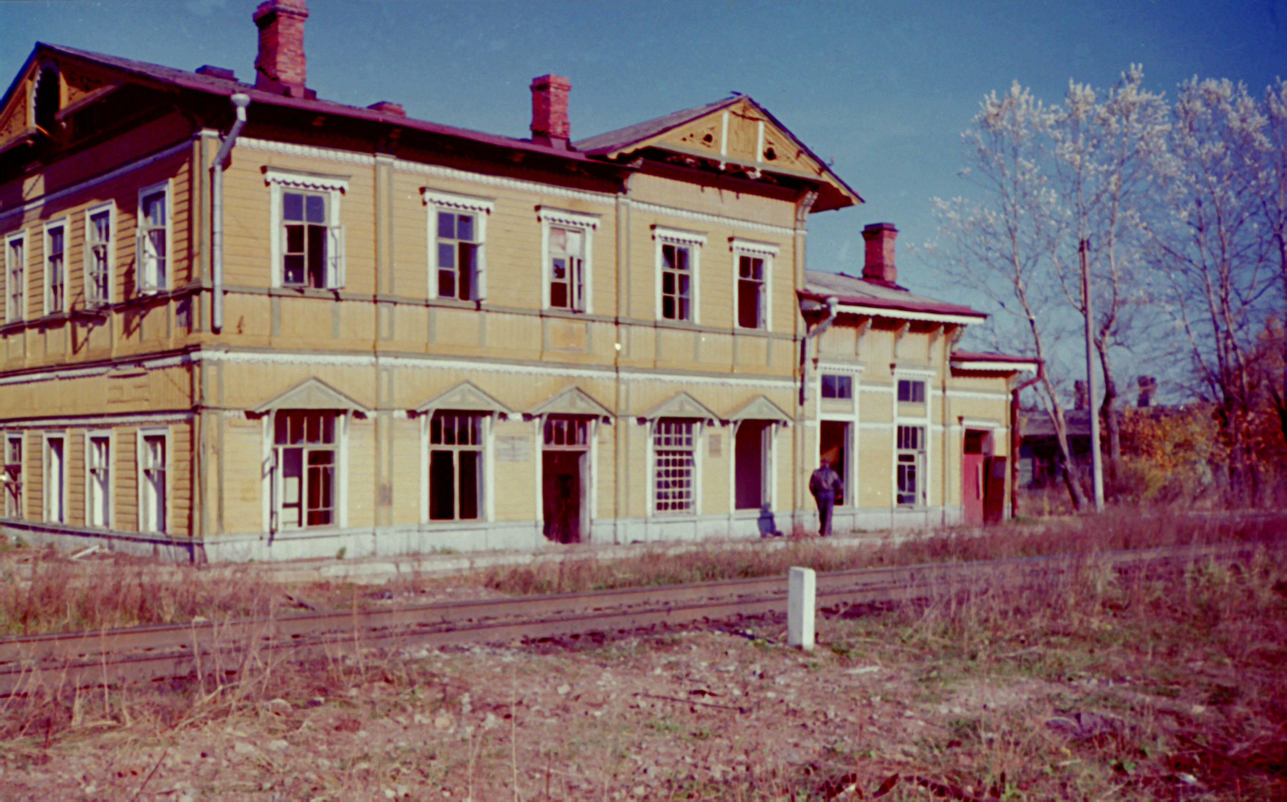 Toila jaamahoone (nüüdseks lammutatud)